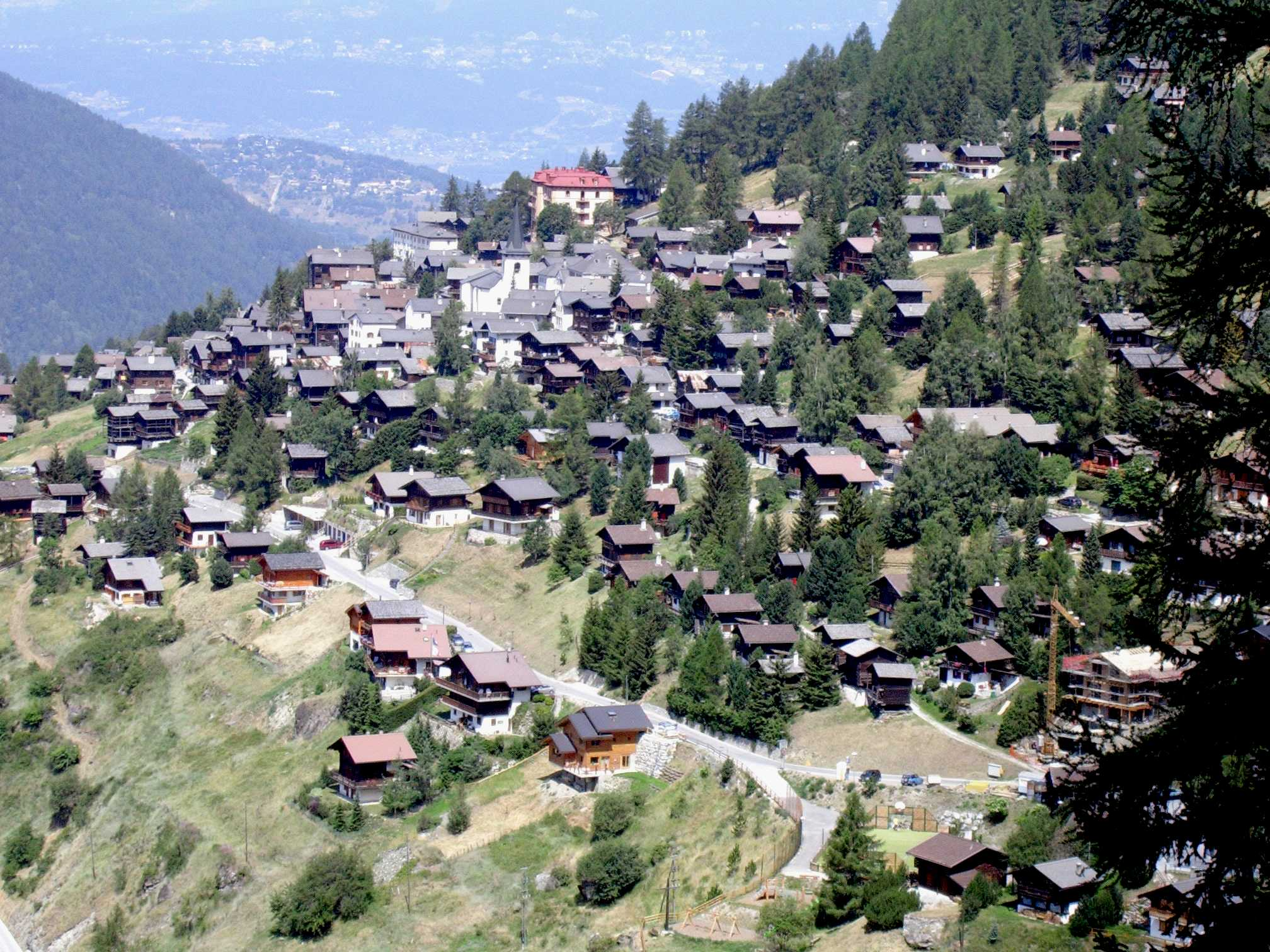 Vue du village de St-Luc en Valais Contents 1 Date 2 Licensing 3 Licensing 4 Original upload log Date Juillet 2006 Licensing Photo personnelle par Albins